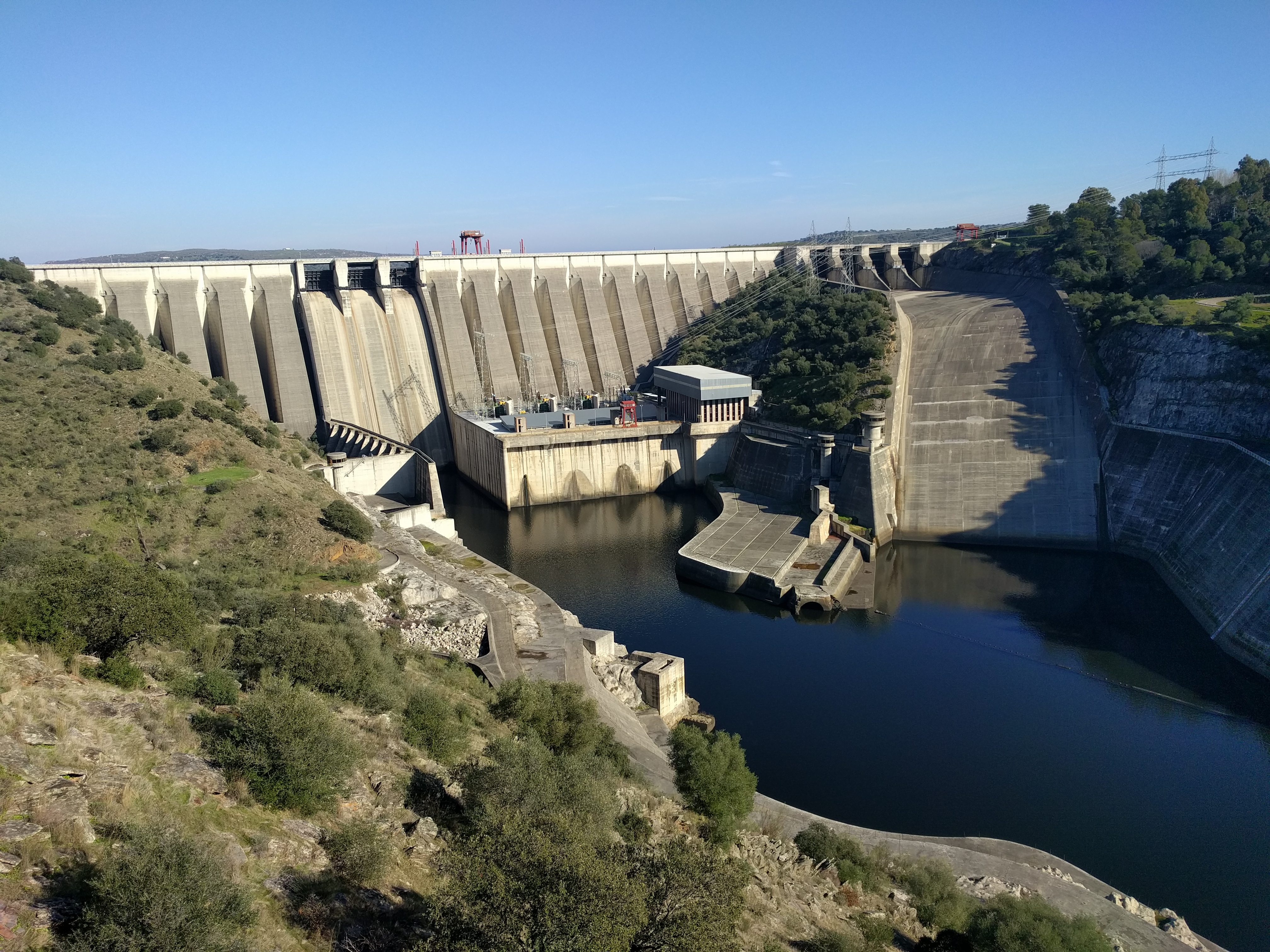 La presa de Alcántara II